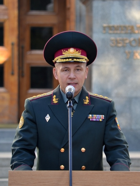 Генерал-полковник Валерій Гелетей